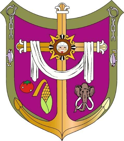 El escudo esta circundado por una bordadura en verde limón en cuyos angulos superiores aparecen un par de grilletes y una cadena rota, que indican que fue un pueblo sometido a finales del siglo XIX por el latifundista de la Hacienda de la Labor, pero que a la caída del sistema dictatorial a principios del siglo XX logro su liberación. En ambos lados un pez que con el ancla indican la vida lacustre del poblado y que a su vez, es un recurso mas de sobrevivencia; para muchos de los pobladores, no solo es una actividad económica mas, sino que constituye su real fuente de empleo. Al centro del escudo una cruz flordelisada envuelta en un sudario como el principal significado que le da nombre al pueblo. Por su parte, el fondo en color purpura alude al duelo que embarga a la dolorosa, imagen de la Soledad venerada por sus habitantes. La cruz transformada en ancla sobre la bordura y toda en oro metalico, en el transepto, el rostro de una deidad indígena sinónimo del sincretismo religioso. En el cuartel de la izquierda, un jitomate y una mazorca, que dan cuenta de la principal actividad económica; la agricultura hoy en dia, es diversificada al igual son importantes el cultivo de la calabaza, chile, chicharos, tanto de temporal como de riego. En el cuartel de la derecha, el rostro de frente de un mastodonte llamado Gonfoterio, significado del principal hallazgo paleontológico en la rivera de Chapala.